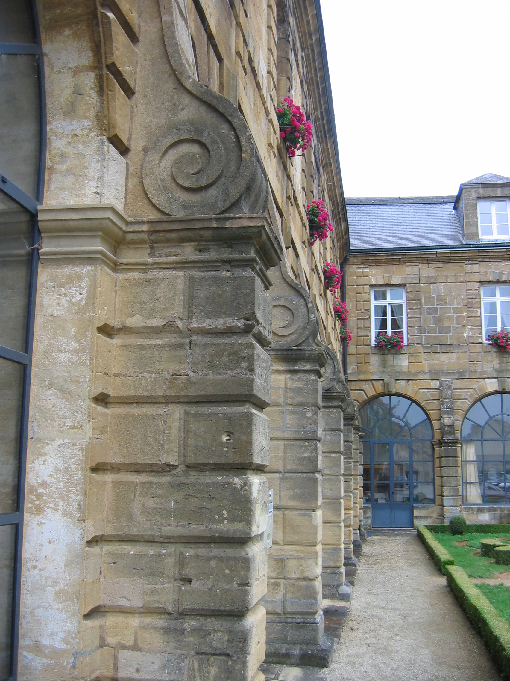 Vue de l'abbaye de Mouzon